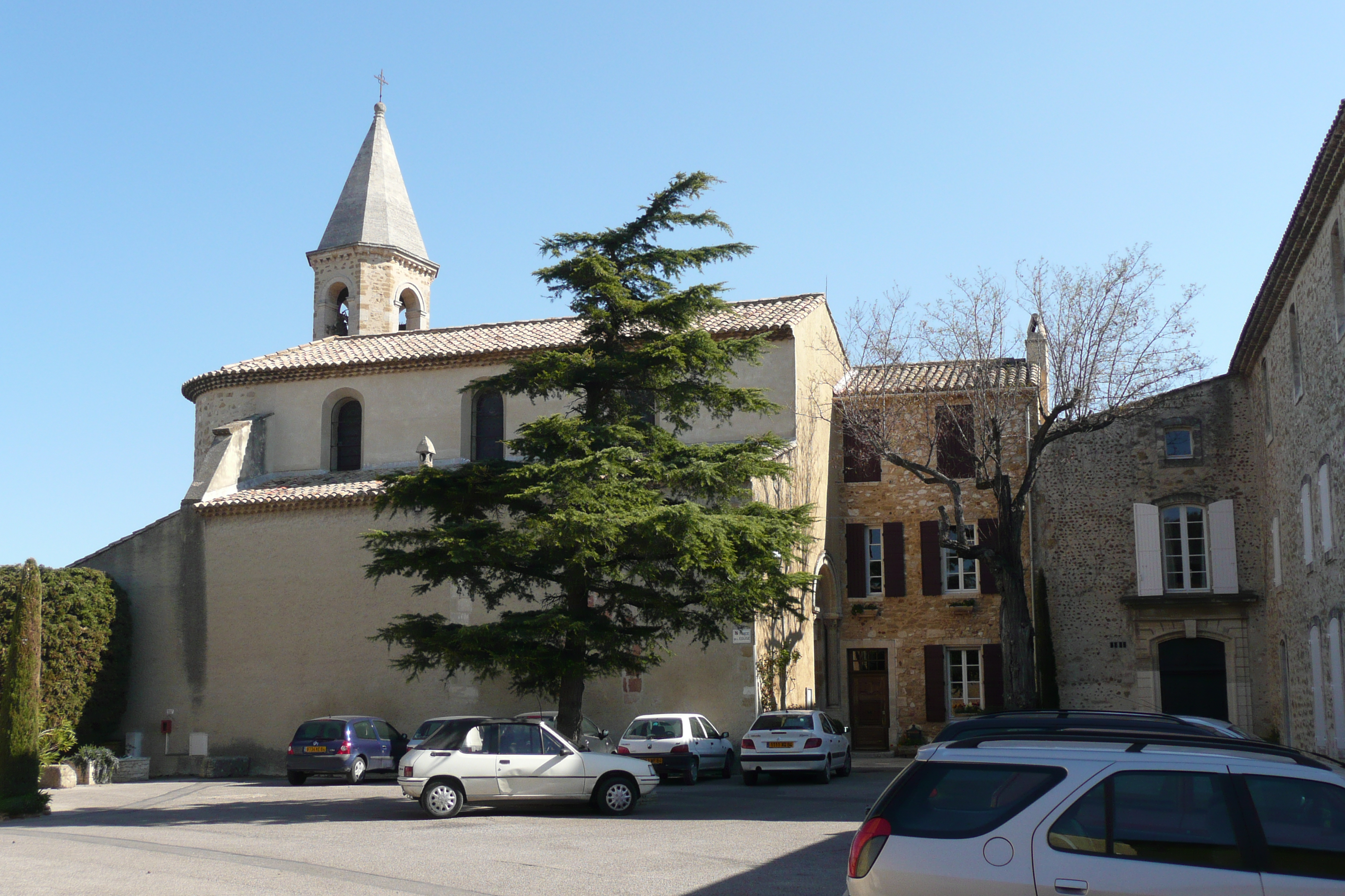 Eglise à Jonquerettes.